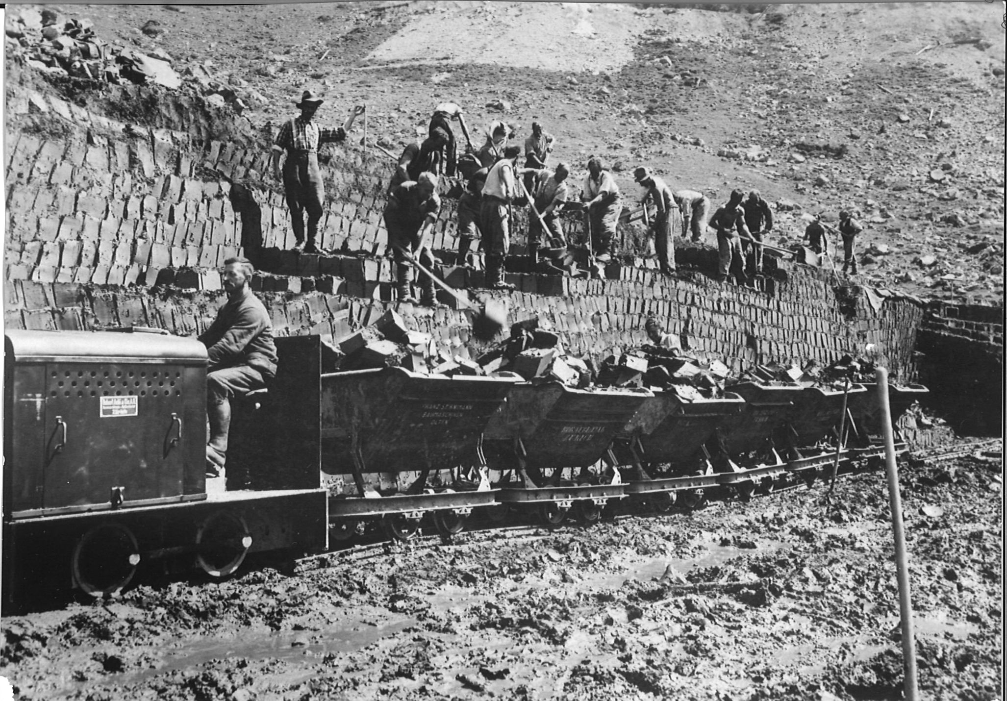 Bauarbeiten am Staubecken des Kraftwerks Bannalp Wolfenschiessen 1935-1937. Foto: Remigi Joller. Staatsarchiv Nidwalden OD 2/14.